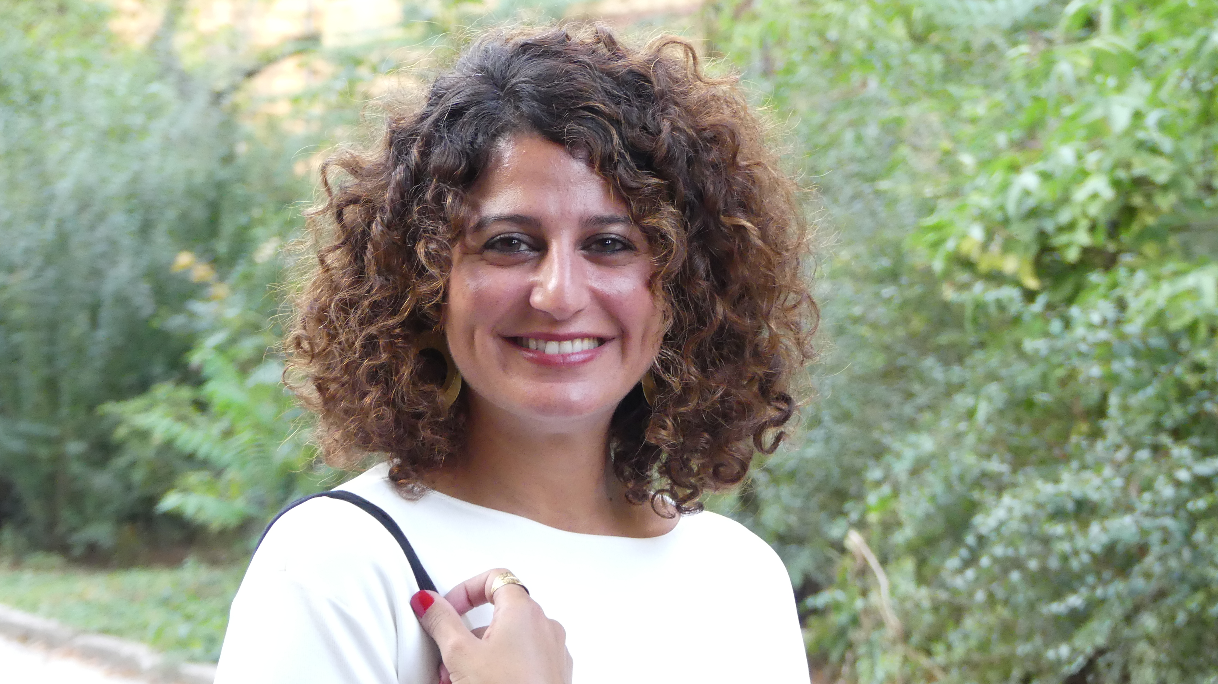 Zeina Abirached on September 11, 2016 in front of the Haus der Berliner Festspiele during her participation at the 16th international literature festival berlin